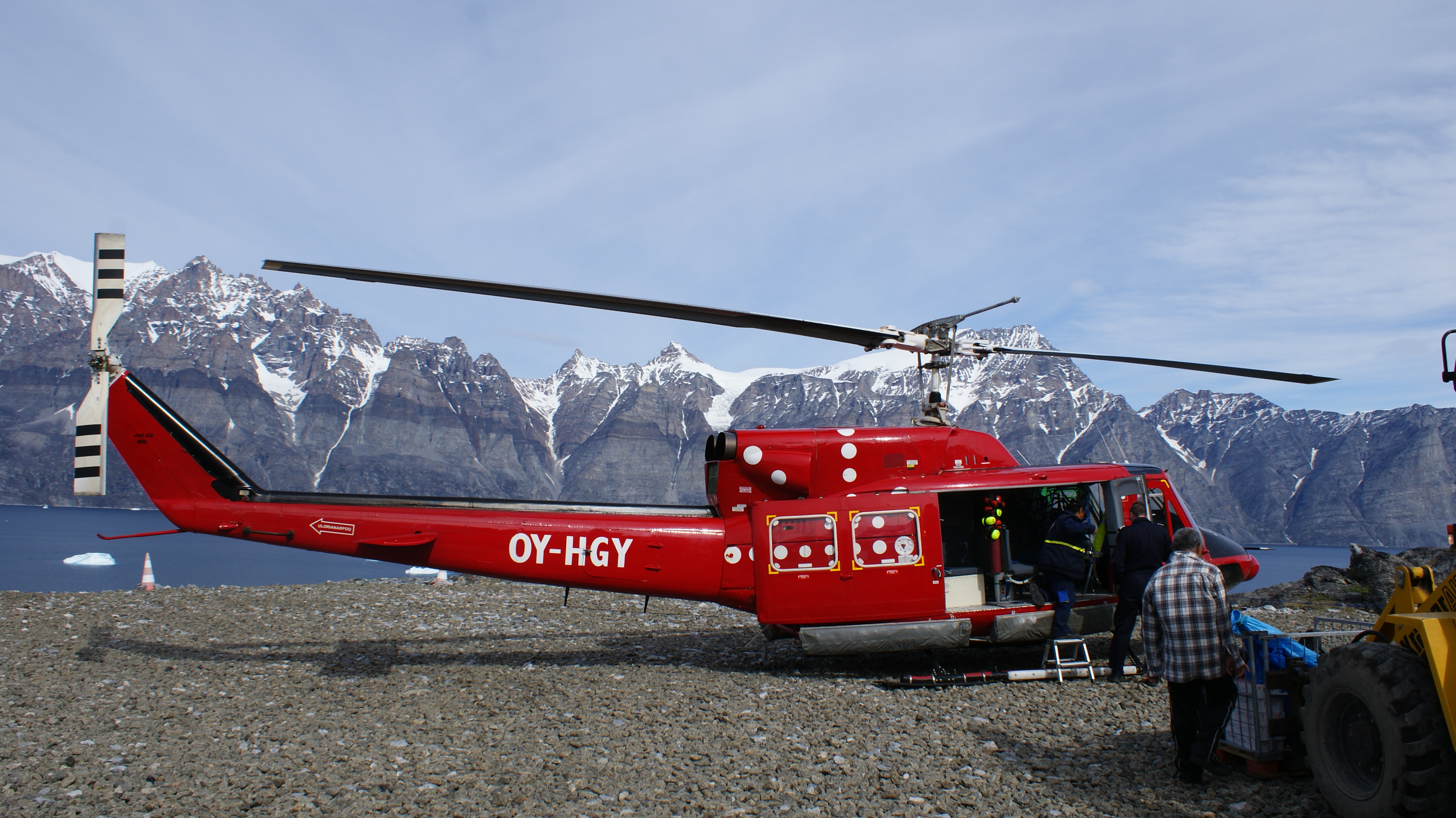 Air Greenland Bell 212 at Ukkusissat Heliport, Greenland.